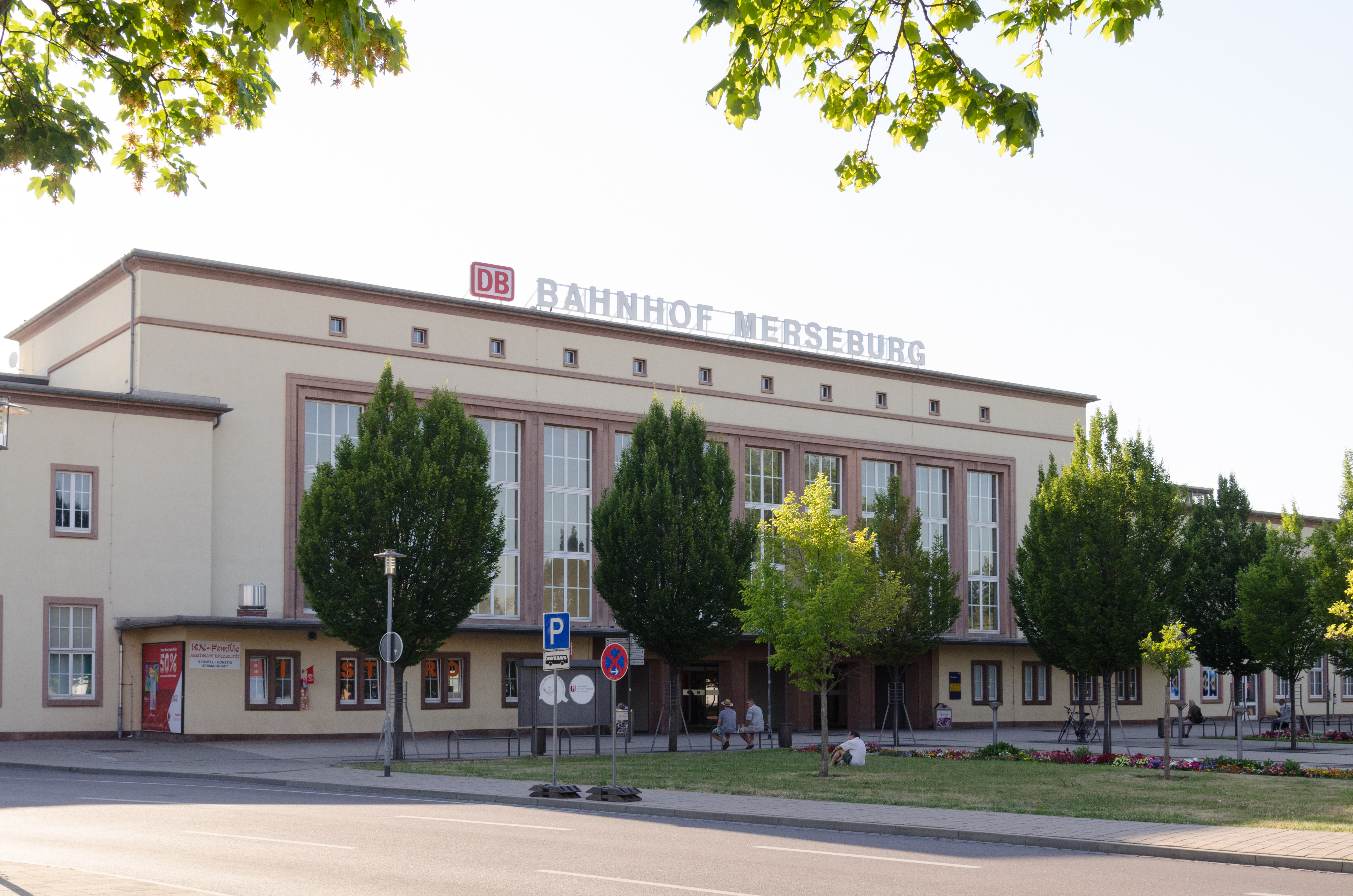 Merseburg, Bahnhofsplatz, Bahnhof